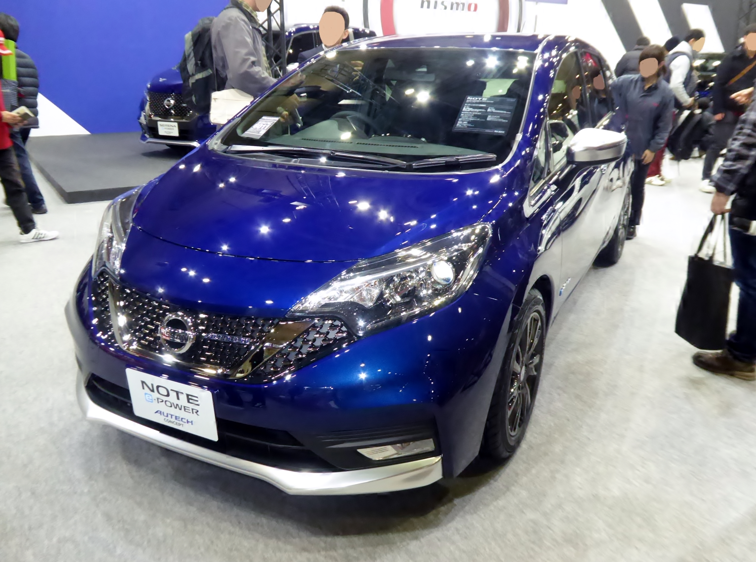 大阪オートメッセ2018に於いて日産・ノートe-POWER AUTECHコンセプトを撮影。